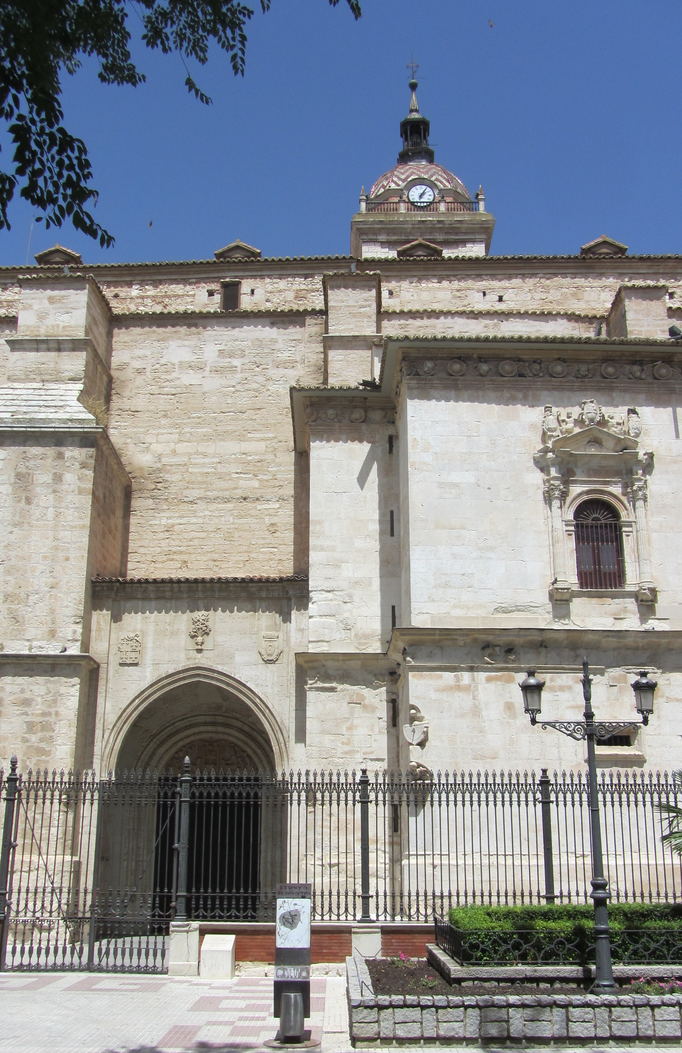 Puerta de los Reyes de la Catedral de Santa María del Prado de Ciudad Real (España), del siglo XV.